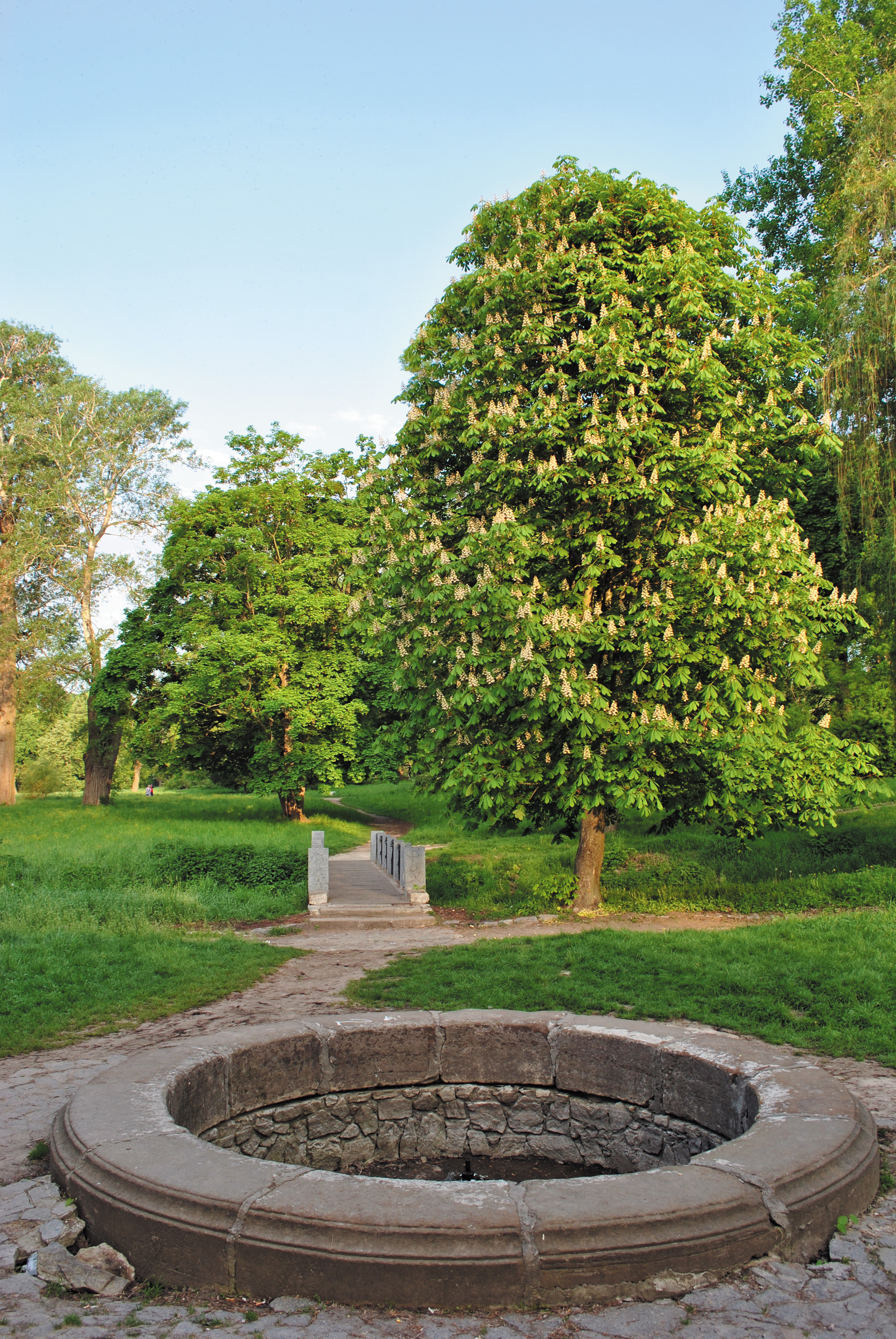 «Олександрія», Білоцерківський район, Білоцерківська міська рада, Фурсівська та Пилипчанська сільські ради